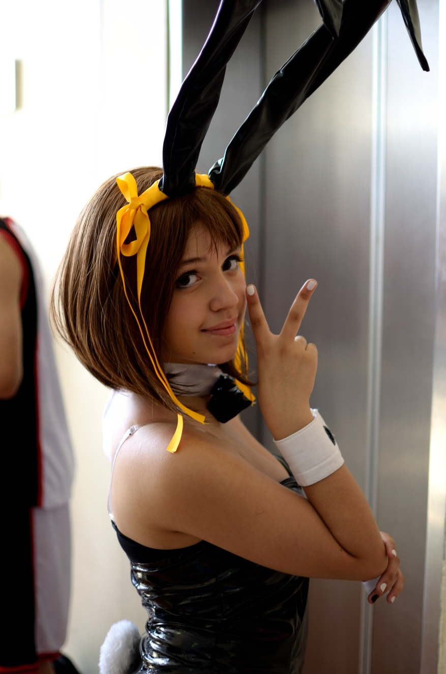 《涼宮春日的憂鬱》涼宮春日（學園祭演唱會兔女郎裝）cosplayer。